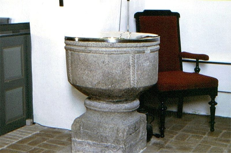 Hinge Kirke, døbefont; Silkeborg Kommune, Denmark